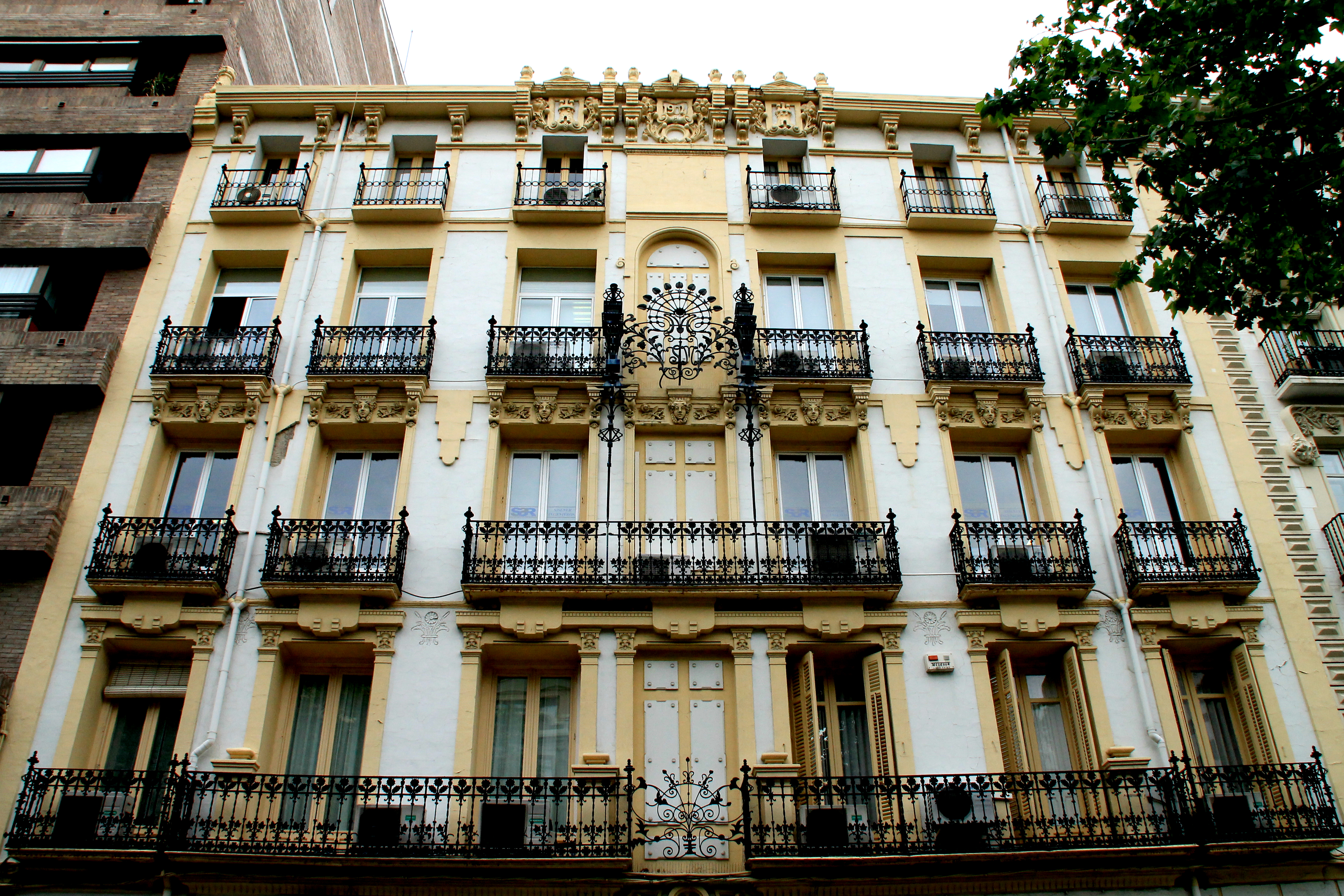 Sagasta monumental en SERGIOSKI1982 PHOTO.